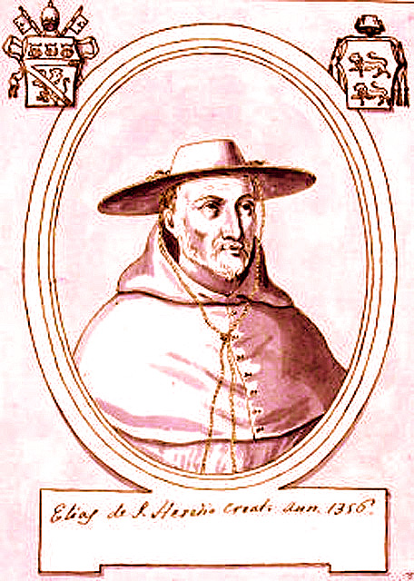 Cardinal Elias de Saint-Yriex